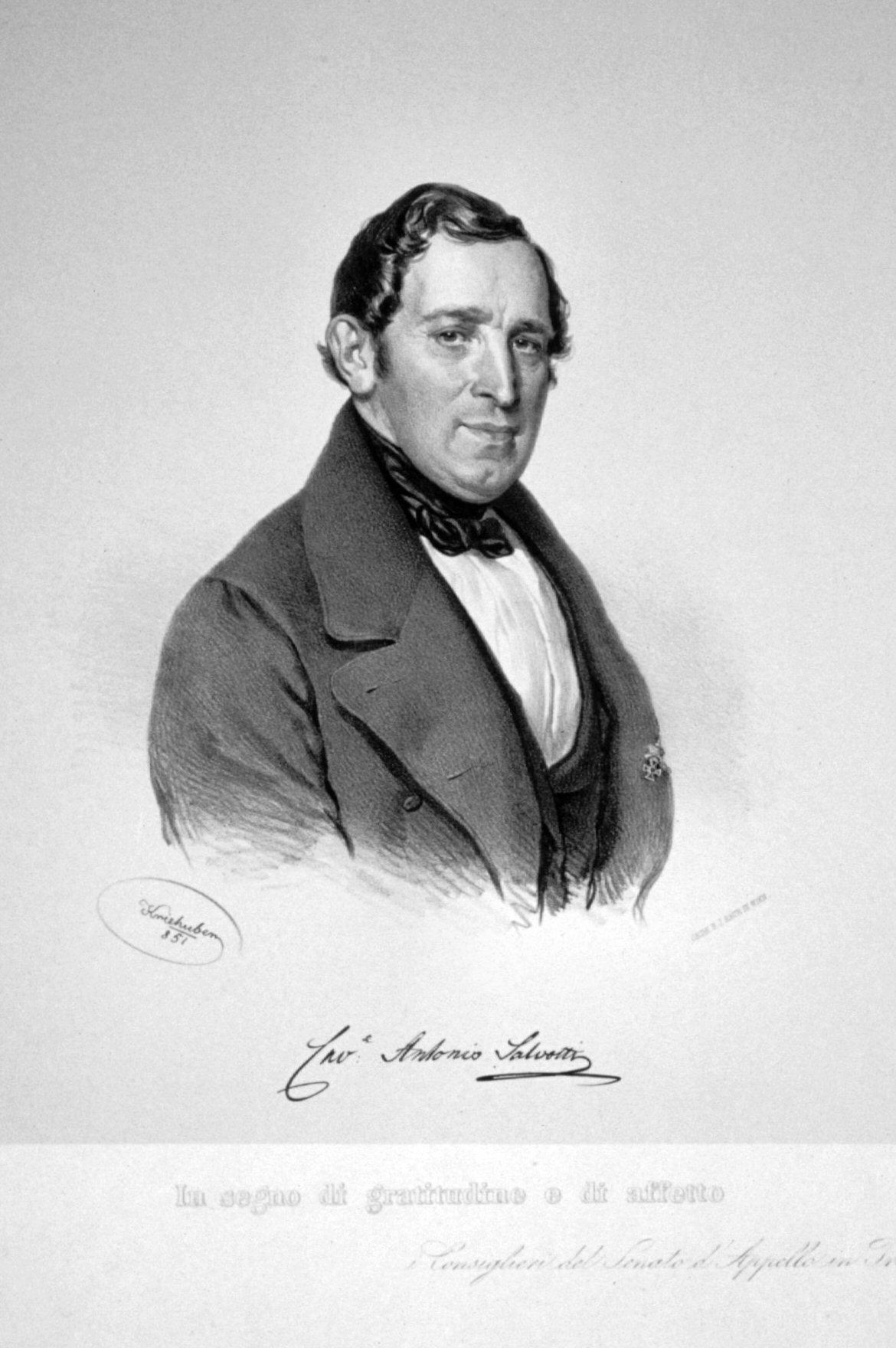 Antonio Salvotti, Freiherr von Eichenkraft und Bindeburg (1789-1866), italienischer Rechsgelehrter. Lithographie von Josef Kriehuber, 1851